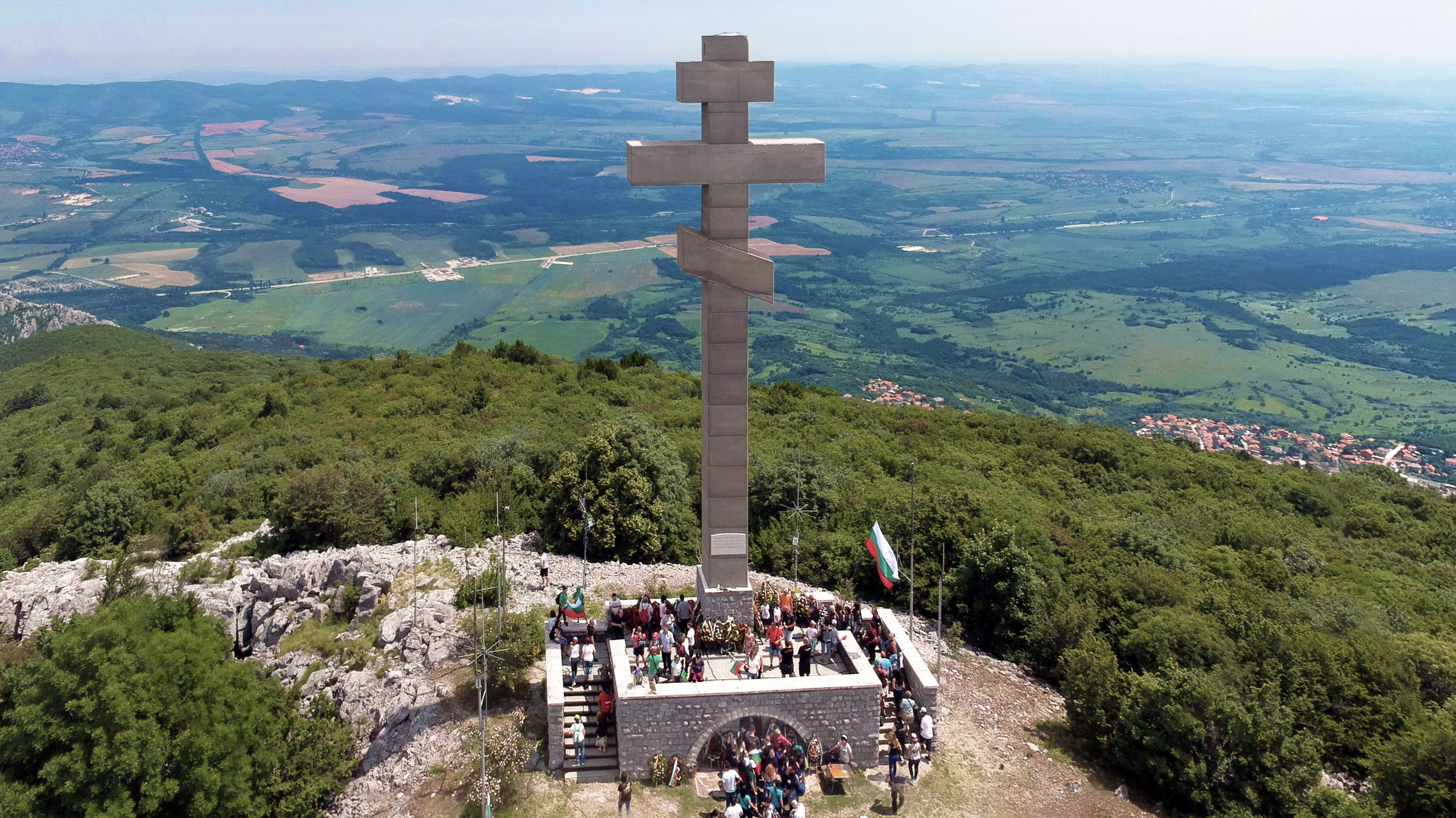 Въздушна снимка на паметника на Околчица по време на честването на 142 годишнината от гибелта на Ботев и неговата чета.